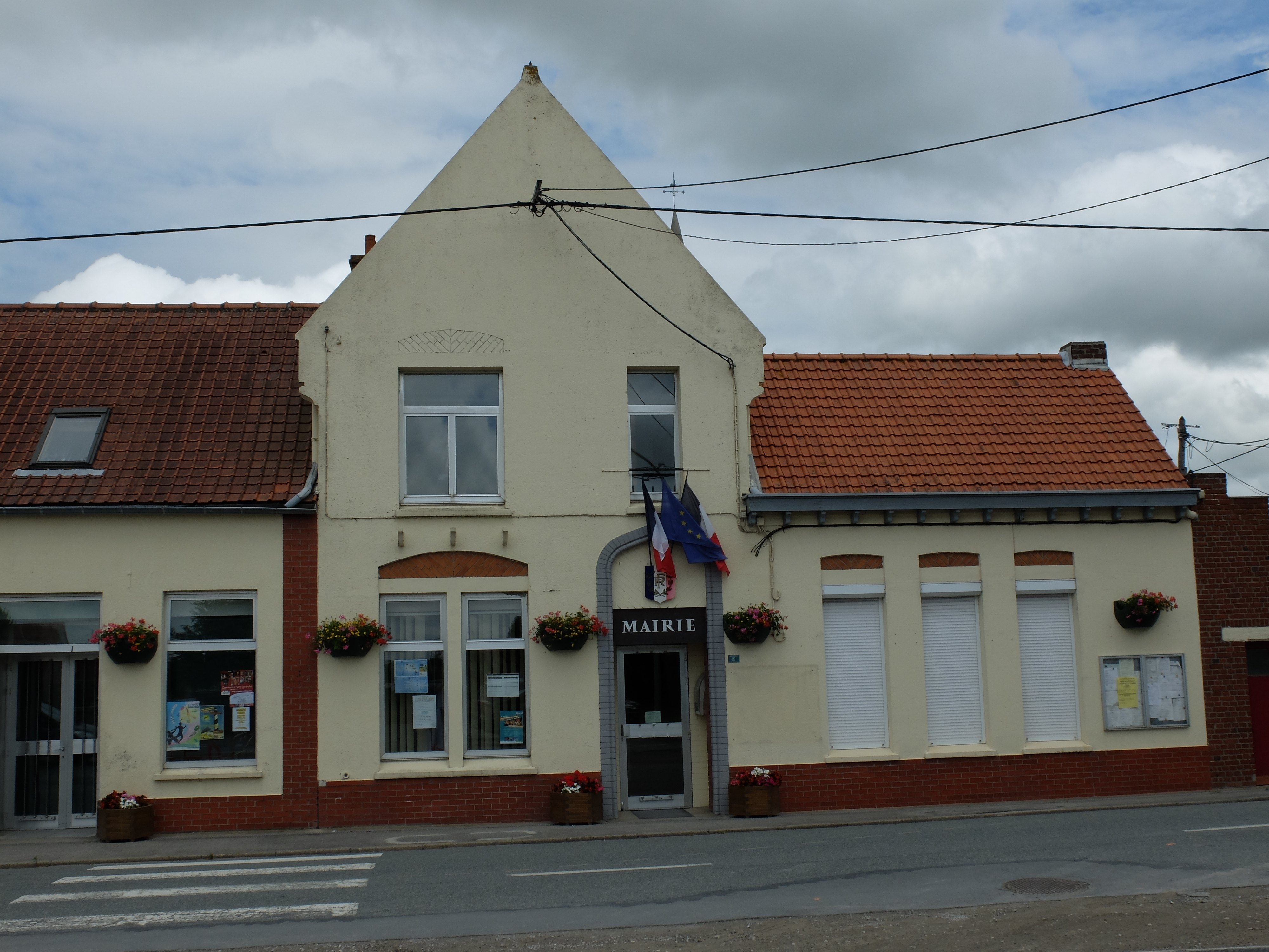 Vue de la mairie d'Holque.